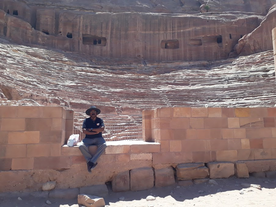 ലേഖകൻ പെട്രയിലെ ഗ്യാലറി എന്ന് വിളിക്കുന്ന സ്റ്റേഡിയത്തിനു മുന്നിൽ ഇരിക്കുന്നു .!